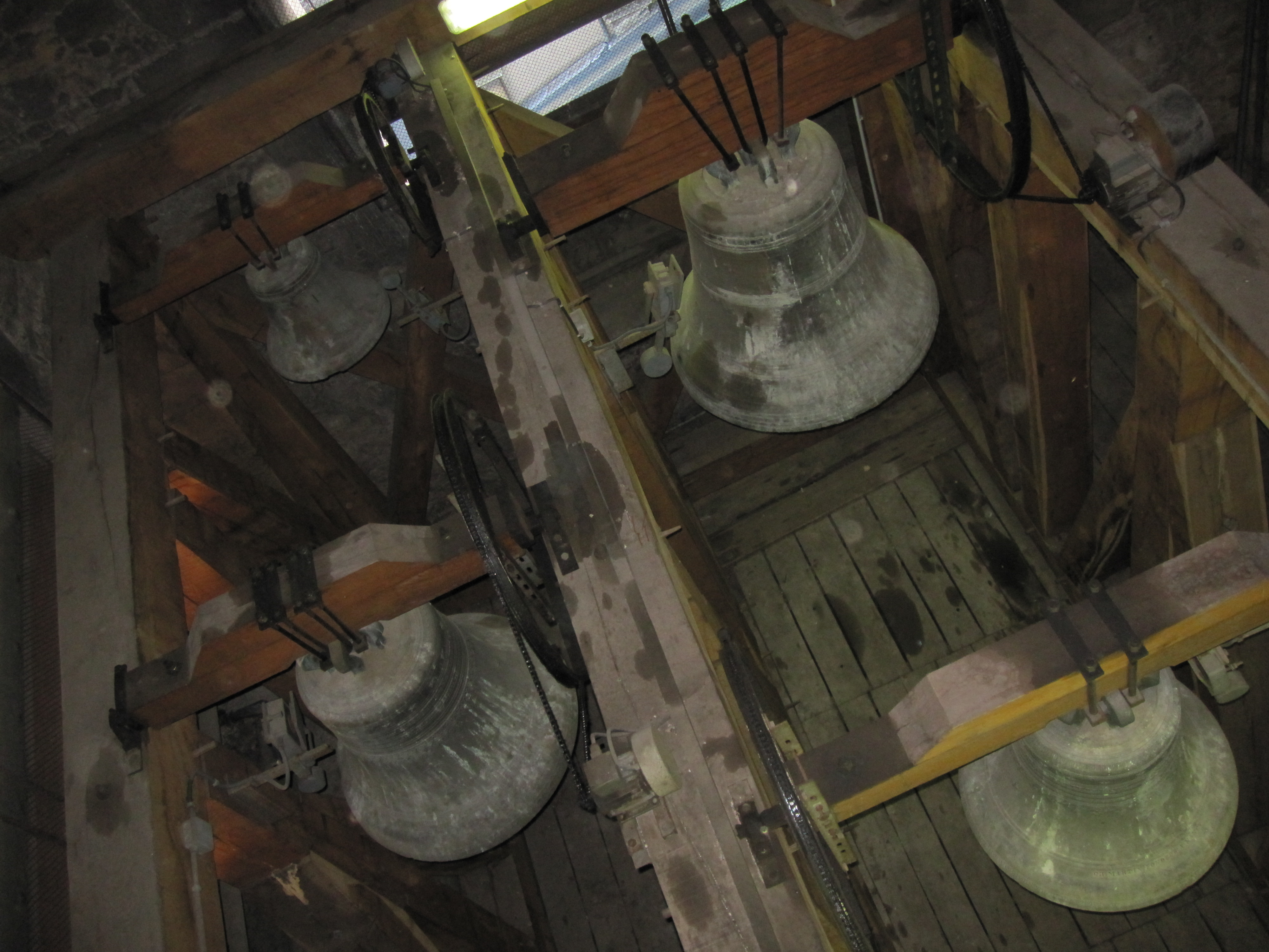 Cloches de la cathédrale de Nancy